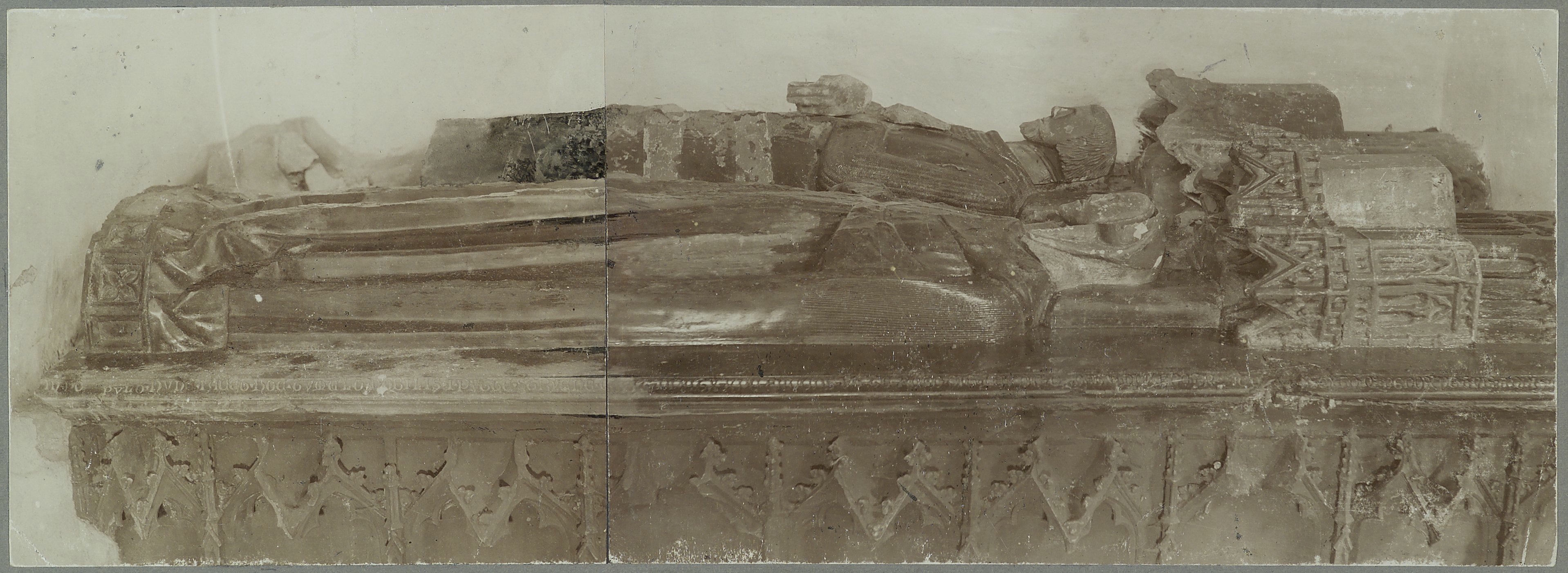 Nederlands Hervormde Kerk: Interieur graftombe